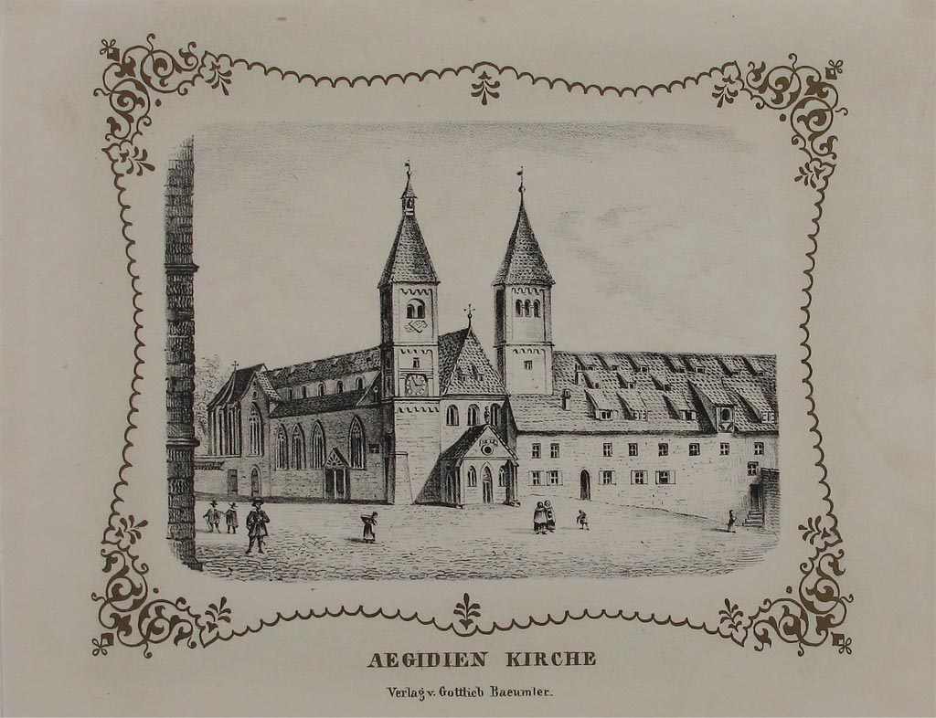 Alt-Nürnberg, Aegidienkirche, Lithographie, bei Gottlieb Bäumler, Nürnberg 1846. Ca. 14 x 17 cm